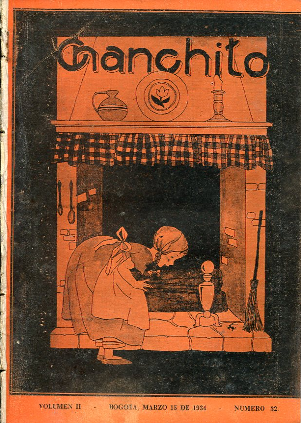 Portada de la Revista